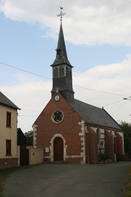 Edifice du 18ème siècle. Clocher en ardoises très effilé du 19ème- Décor peint néogothique. Le Maître autel constitue un très bel ensemble d'époque Louis XVI. Retable du 18ème siècle magnifiquement restauré